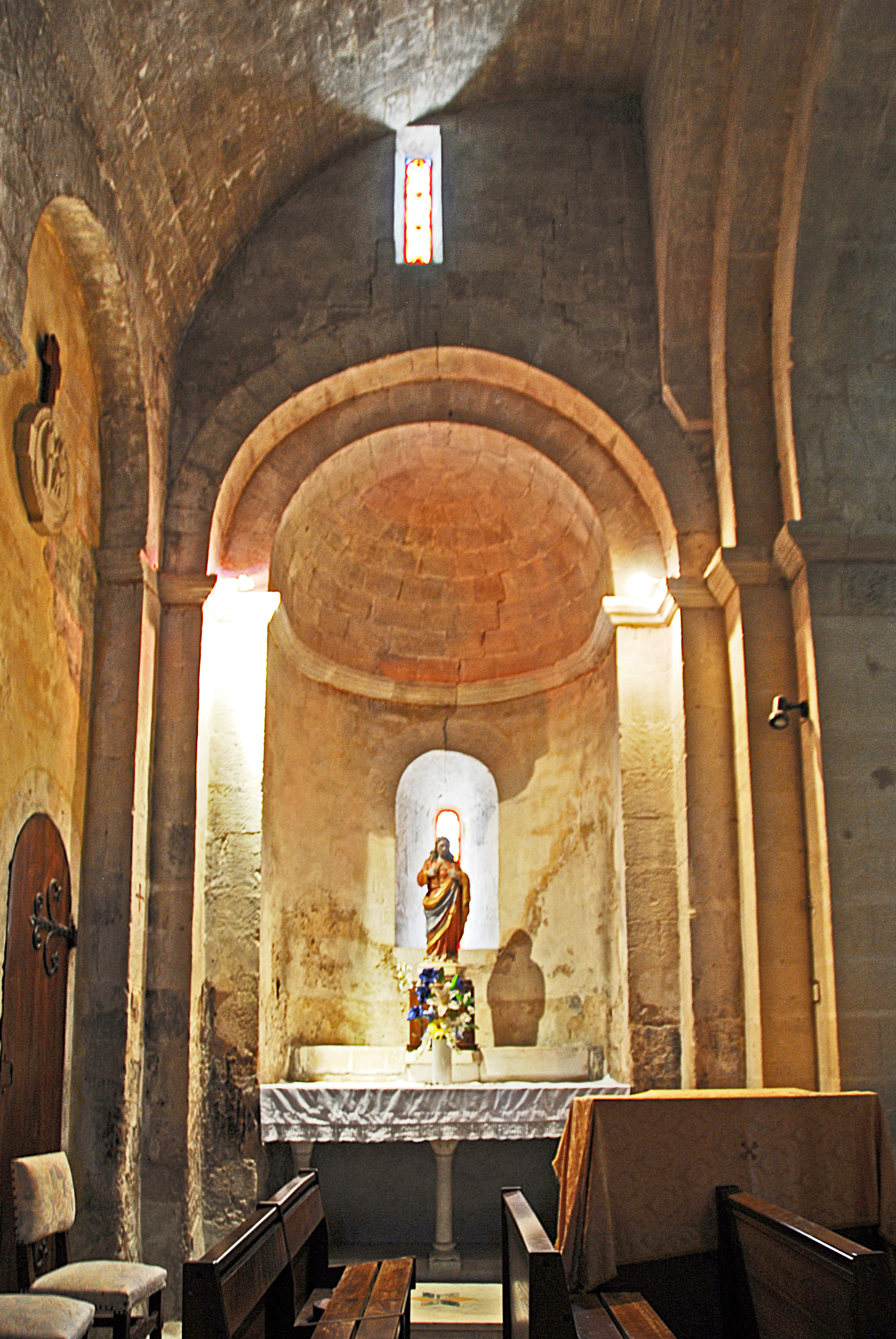 St-Michel de La Garde- Adhémar. nördl. Chorkapelle